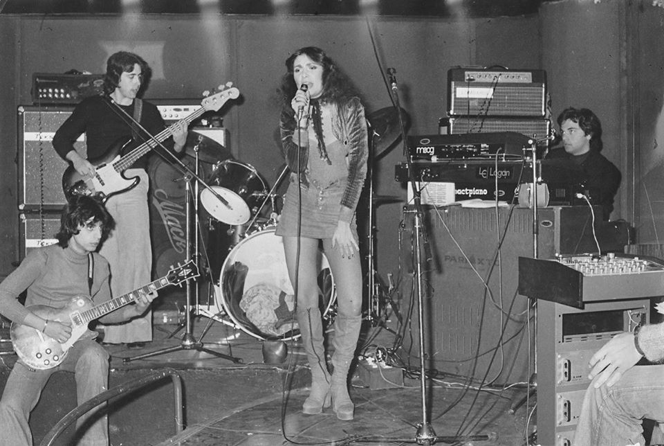 prove gruppo 1975